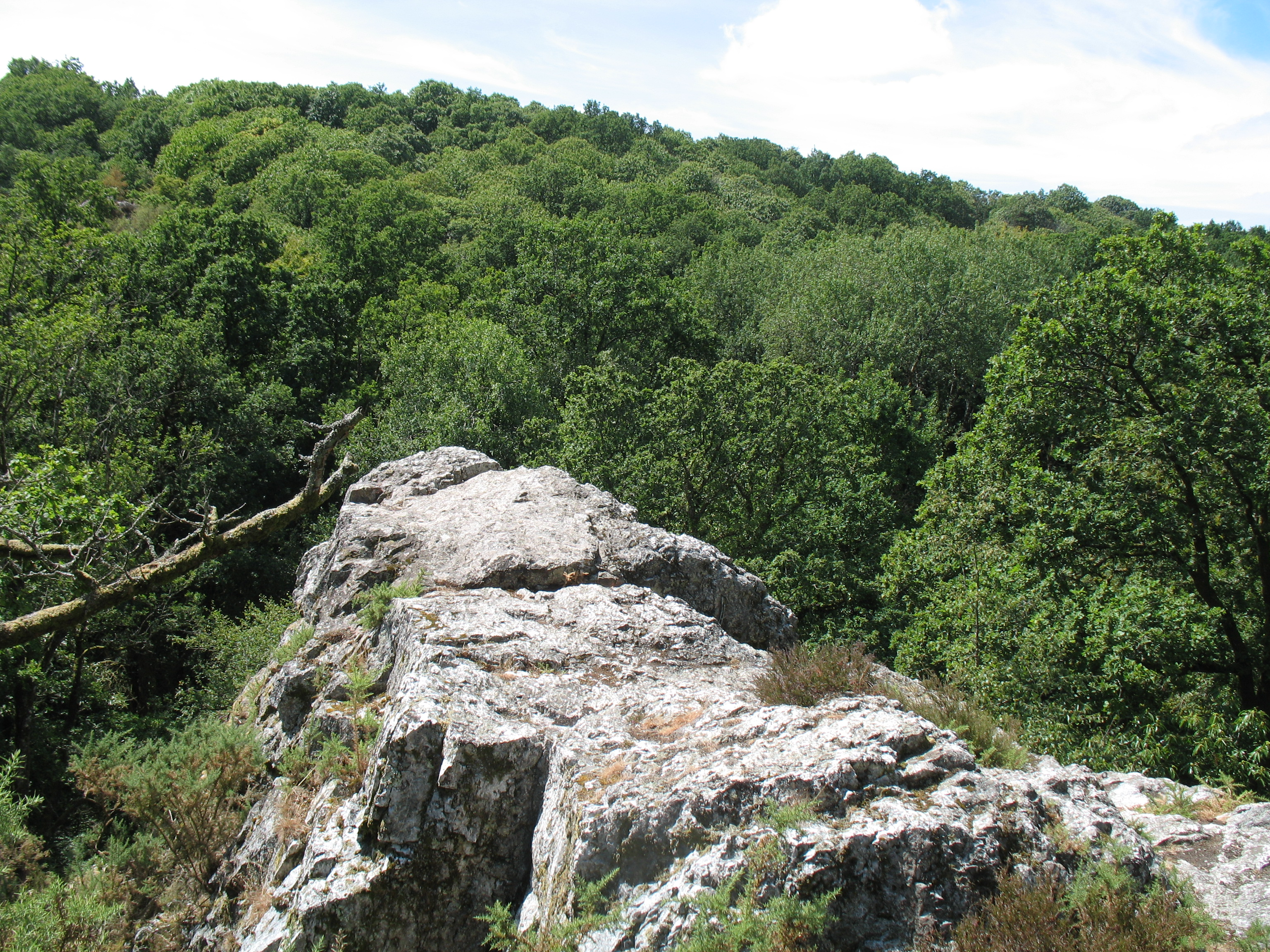 Les falaises de Saut Roland à Dompierre-du-Chemin. Espace naturel départemental et site officiel d’escalade.